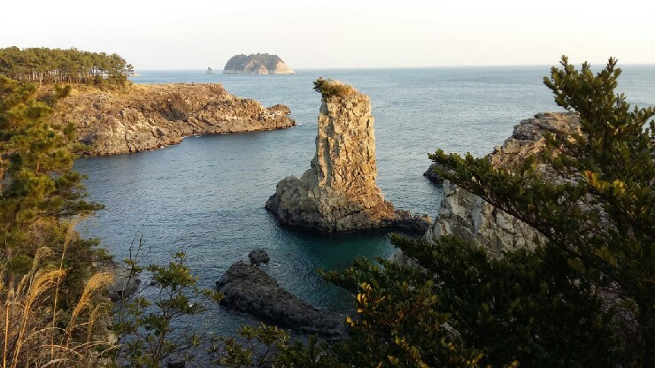 한국어 (조선): 외돌개를 촬영